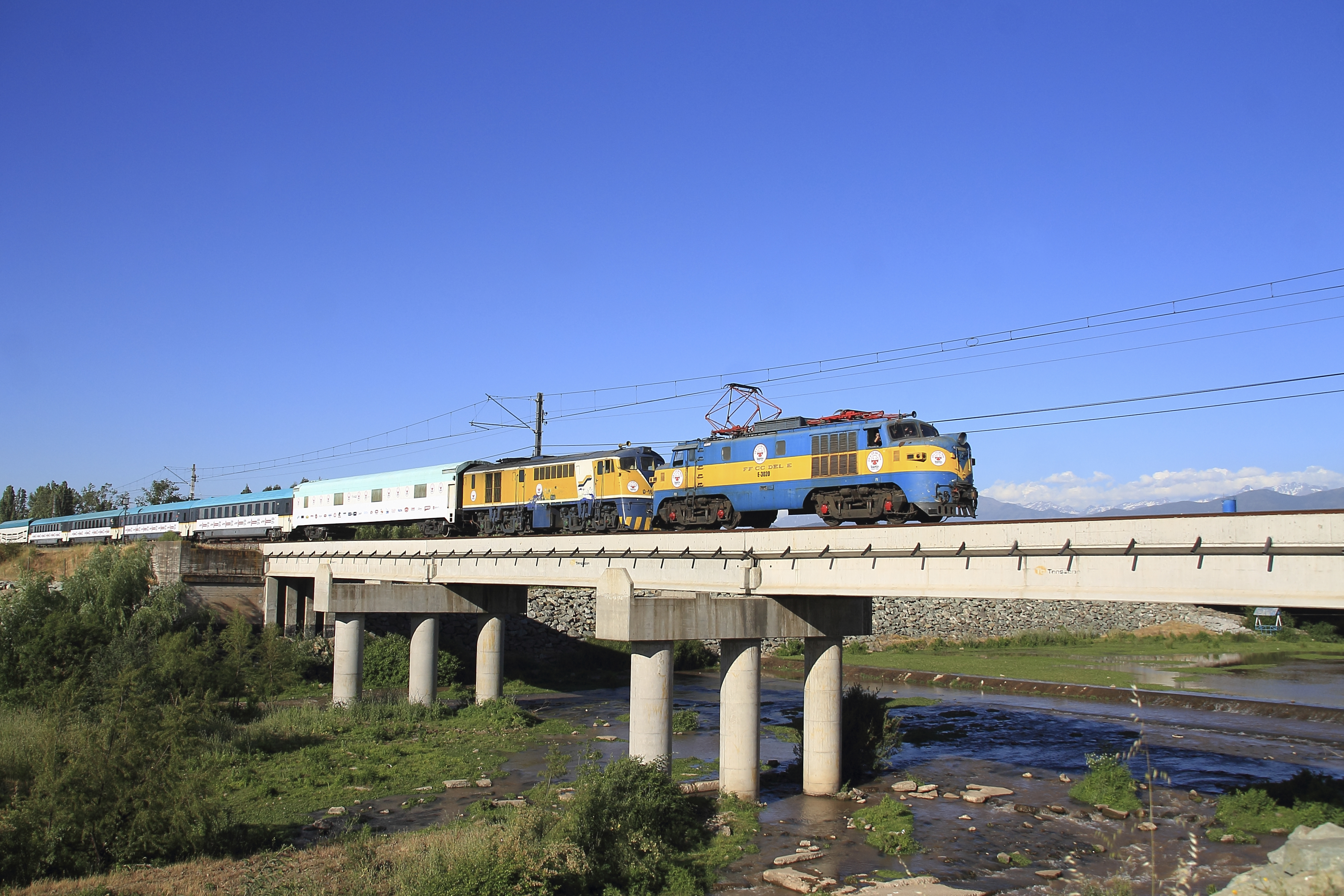 Un tren que tiene como misión, la de motivar a la gente a lo largo de nuestro extenso territorio a aportar y colaborar con esta ya tan cuestionada obra benéfica, que ayuda a la gente discapacitada de nuestro país. Y que en su tramo centro sur, volvió a realizarse tal como hace un par de años atrás, en tren, es así como #grupoefe estuvo presente con esta composición, muy similar a la que corrio el año 2013 con los turisticos de la araucania. Aqui vemos al tren de la Teleton, cruzar el puente del estero Chimbarongo, situado en las cercanías de la nueva estación Quinta, pasando a una velocidad que nos hace recordar como eran aquellos trenes de larga distancia llamados "rápidos" Estero Chimbarongo, Noviembre, 2014